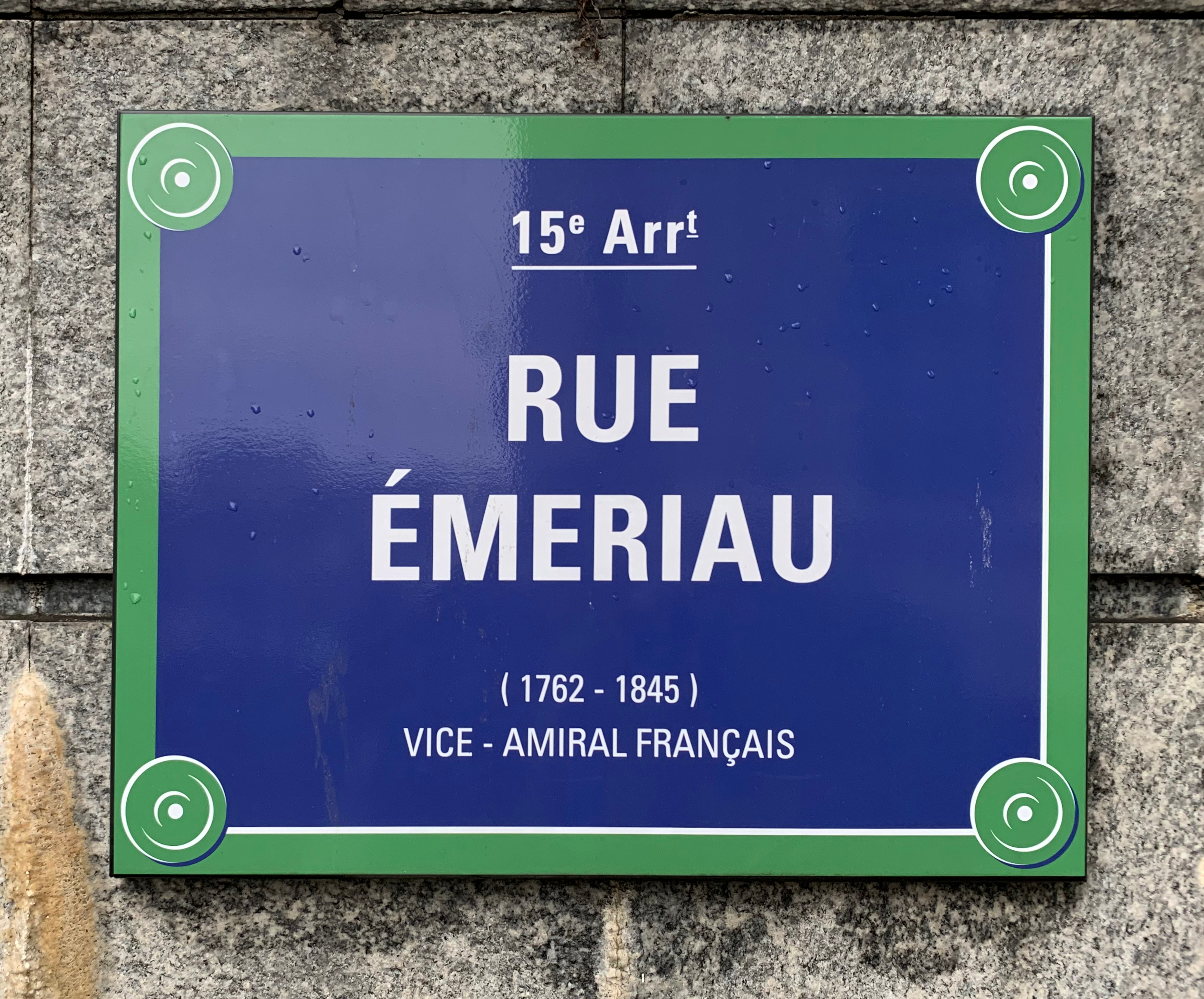 Rue Émeriau (Paris).